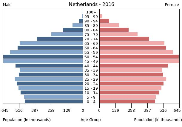 Bevölkerungsstruktur der Niederlande